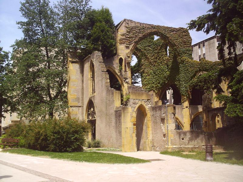 L'église saint Livier de Metz.